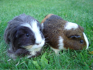 Meerschweinchen